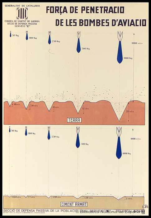 Gràfic amb les forces de penetració de les bombes durant la Guerra Civil Espanyola